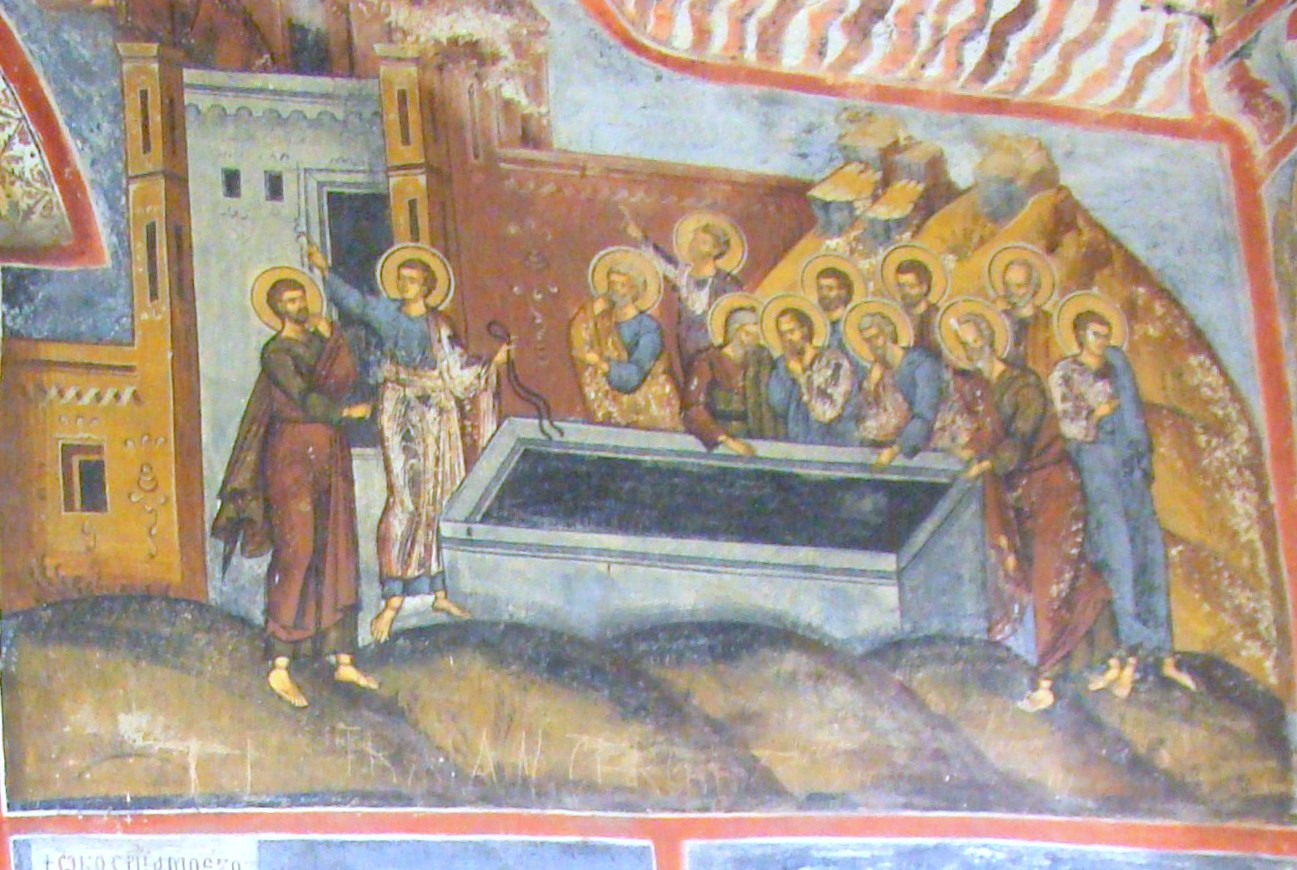 Bolnița „Adormirea Maicii Domnului”, Mănăstirea Hurezi, Vâlcea